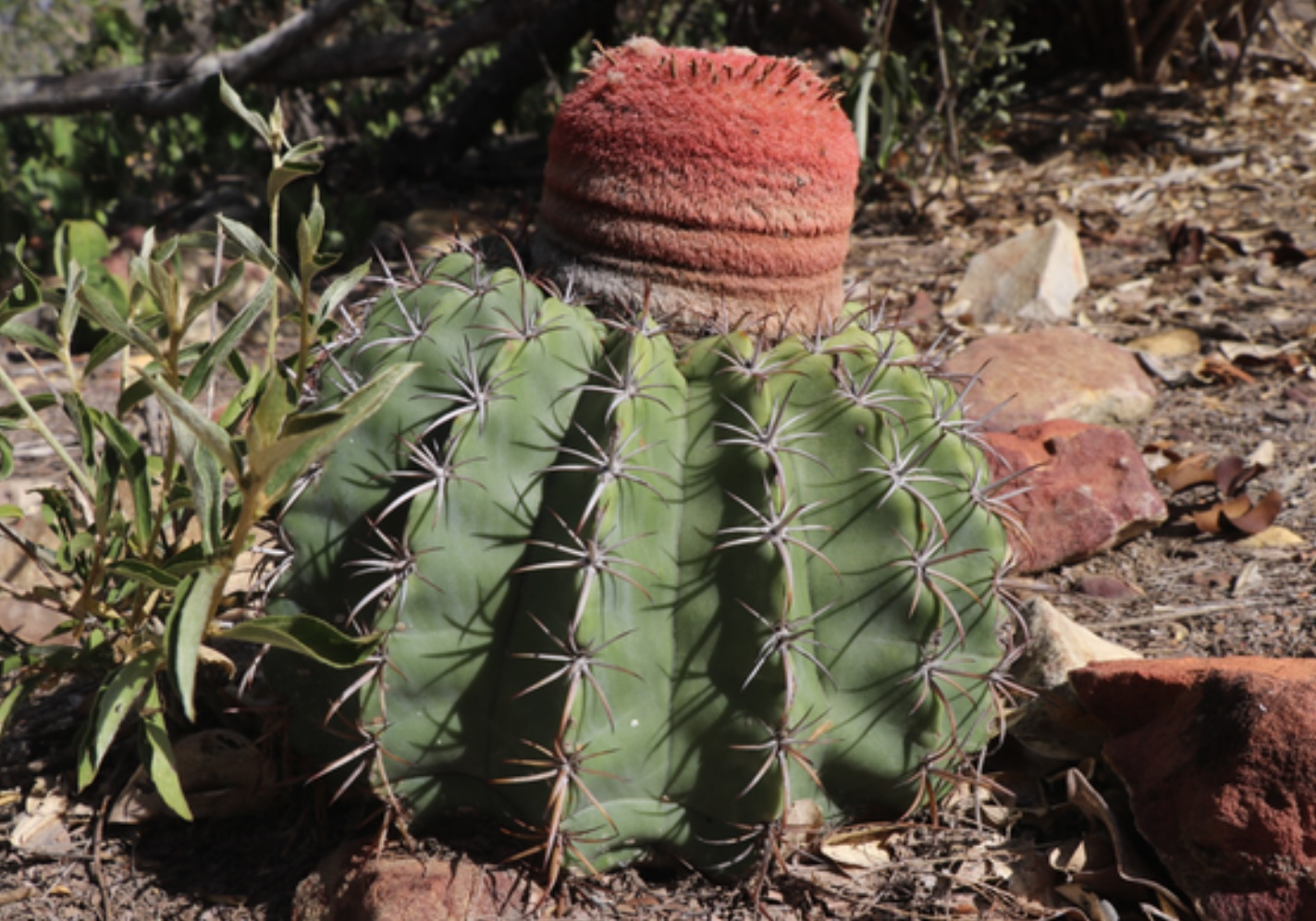 Melocactus zehntneri Bahia Brasil